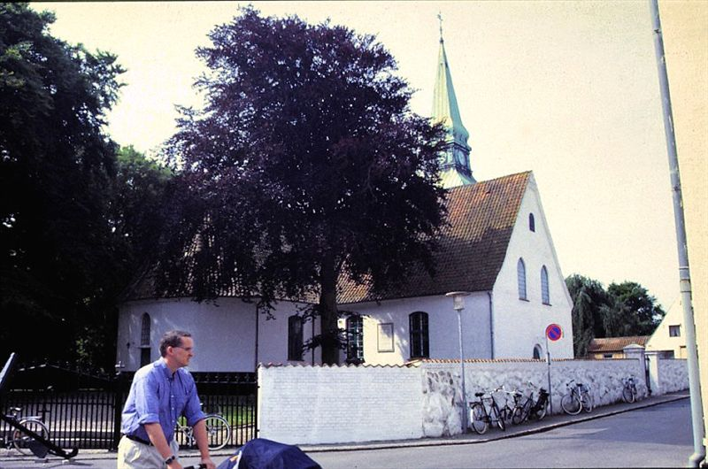 Marstal Kirke i Danmark. Marstal kirke